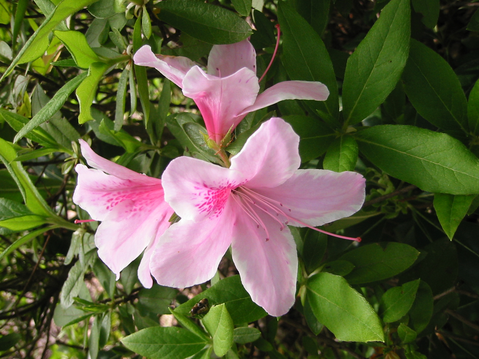 岡山県 吉備津神社にてサツキ